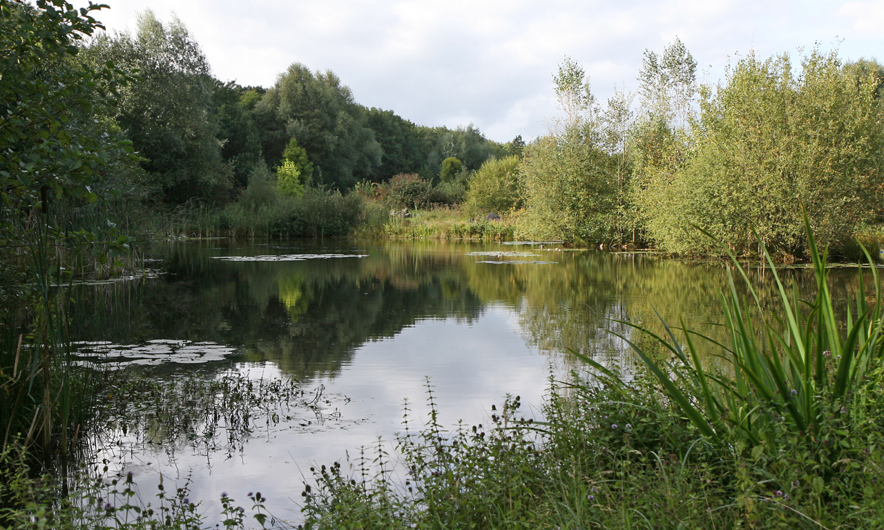 Arboretum Poortbulten